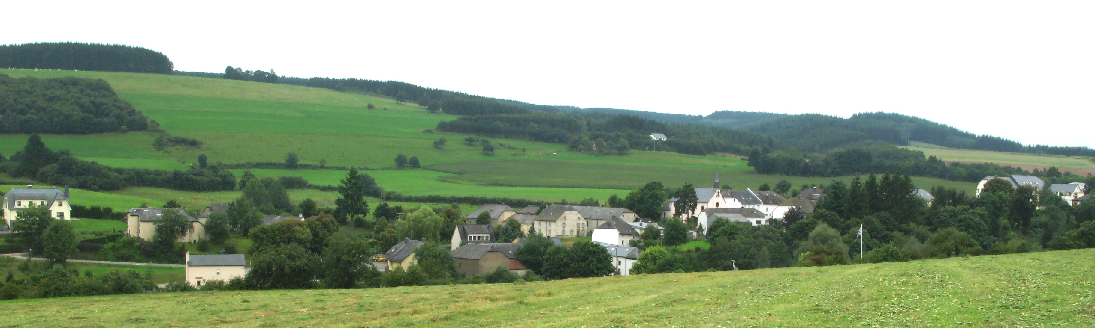 Le village luxembourgeois de Winseler vu des hauteurs du Schëllerfeld